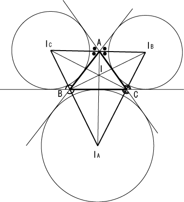 三角形の傍心。オリジナル。下記ライセンス以外にもcc-by-2.5、放棄可能な著作権をすべて放棄したPDとして利用可能です。